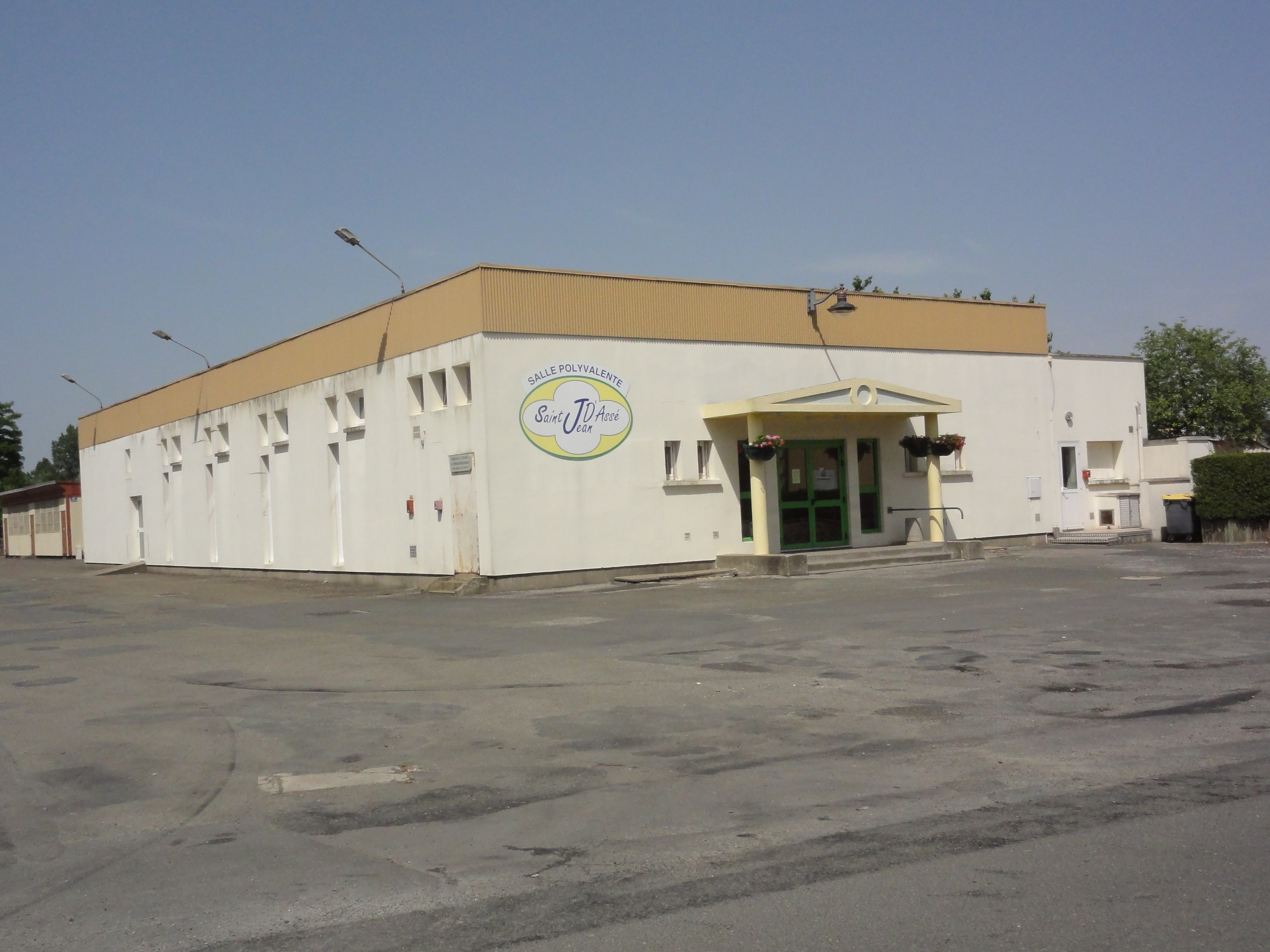 Saint-Jean-d'Assé (Sarthe) salle polyvalente